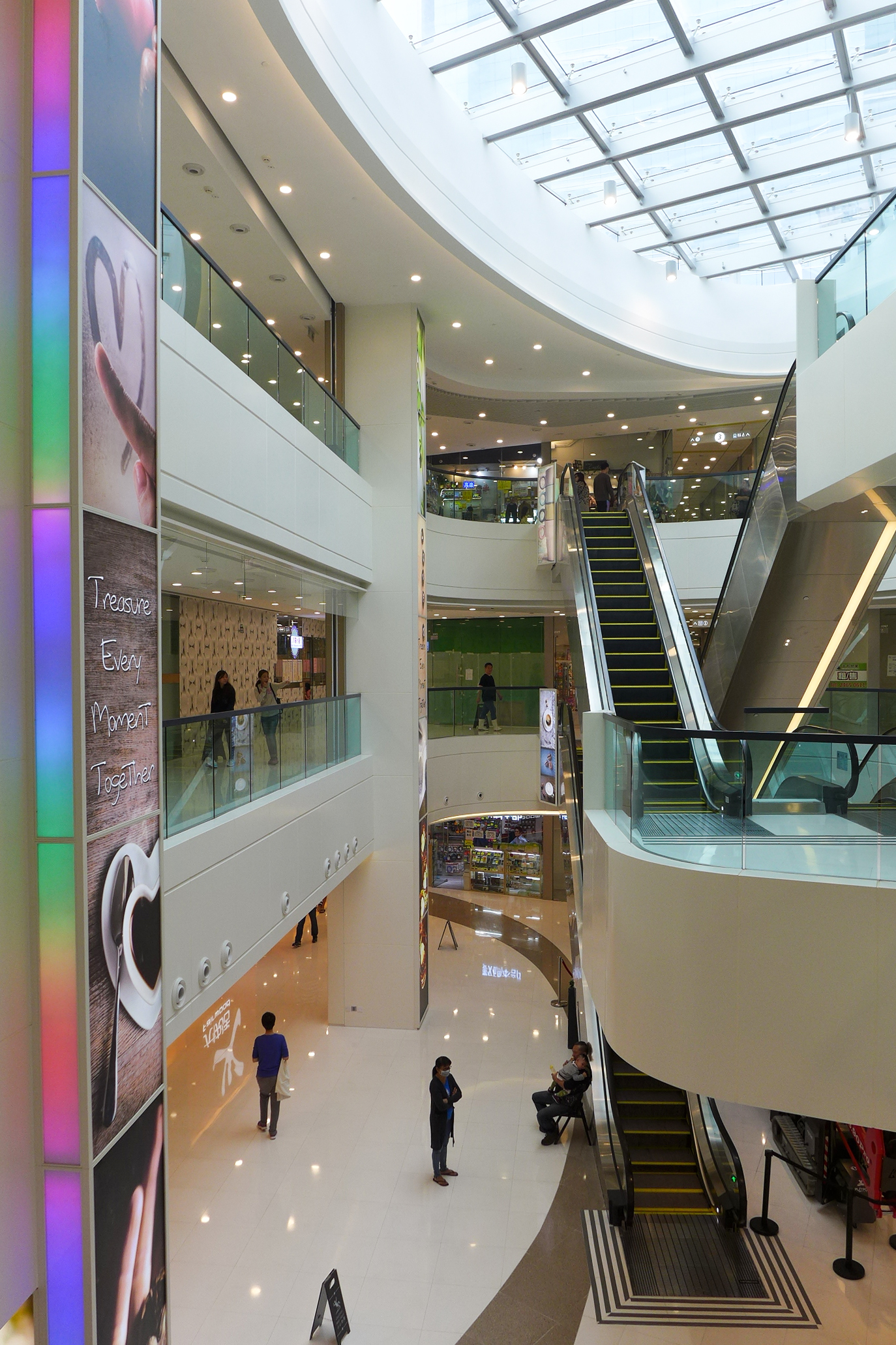 8 Tin Sau Road Atrium